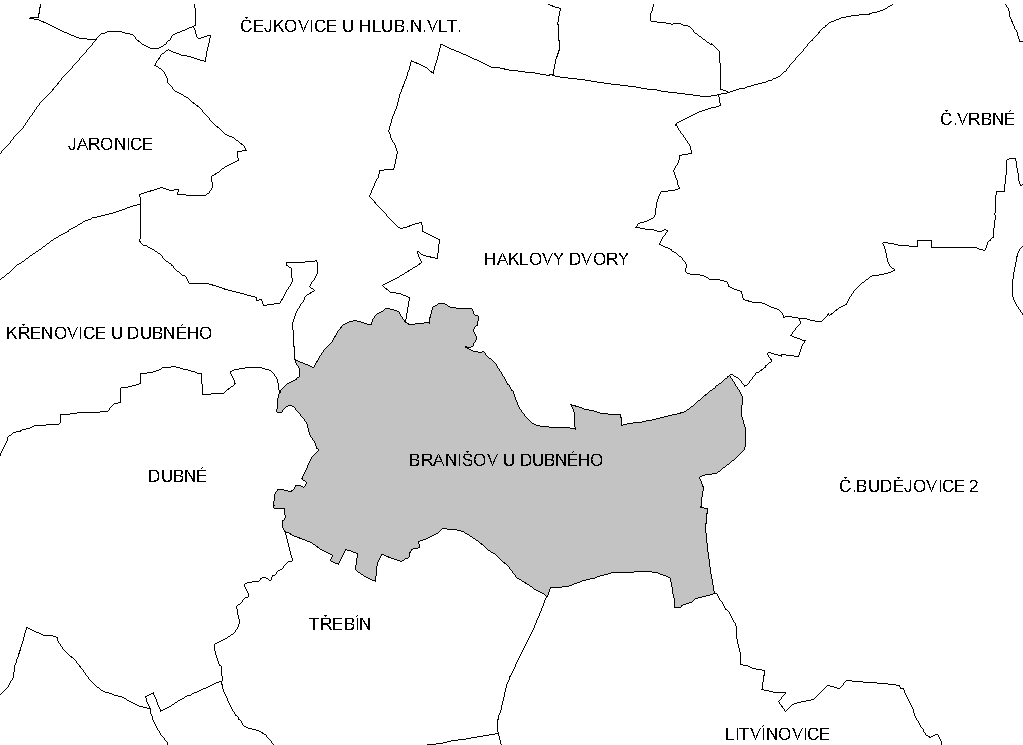 Katastr Branišova